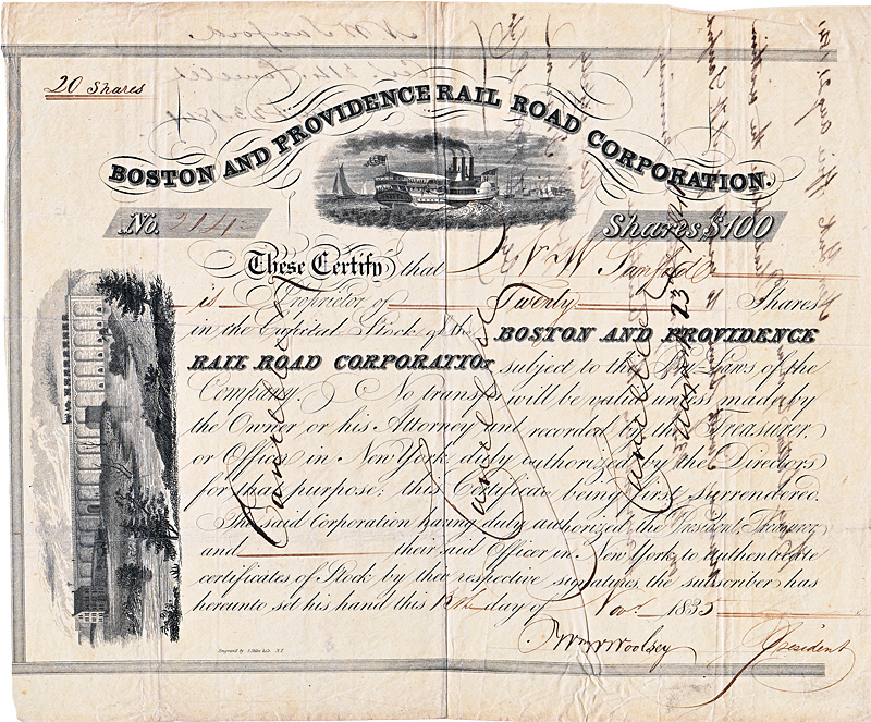 Aktie der Boston & Providence Railroad Corporation vom 13. November 1835